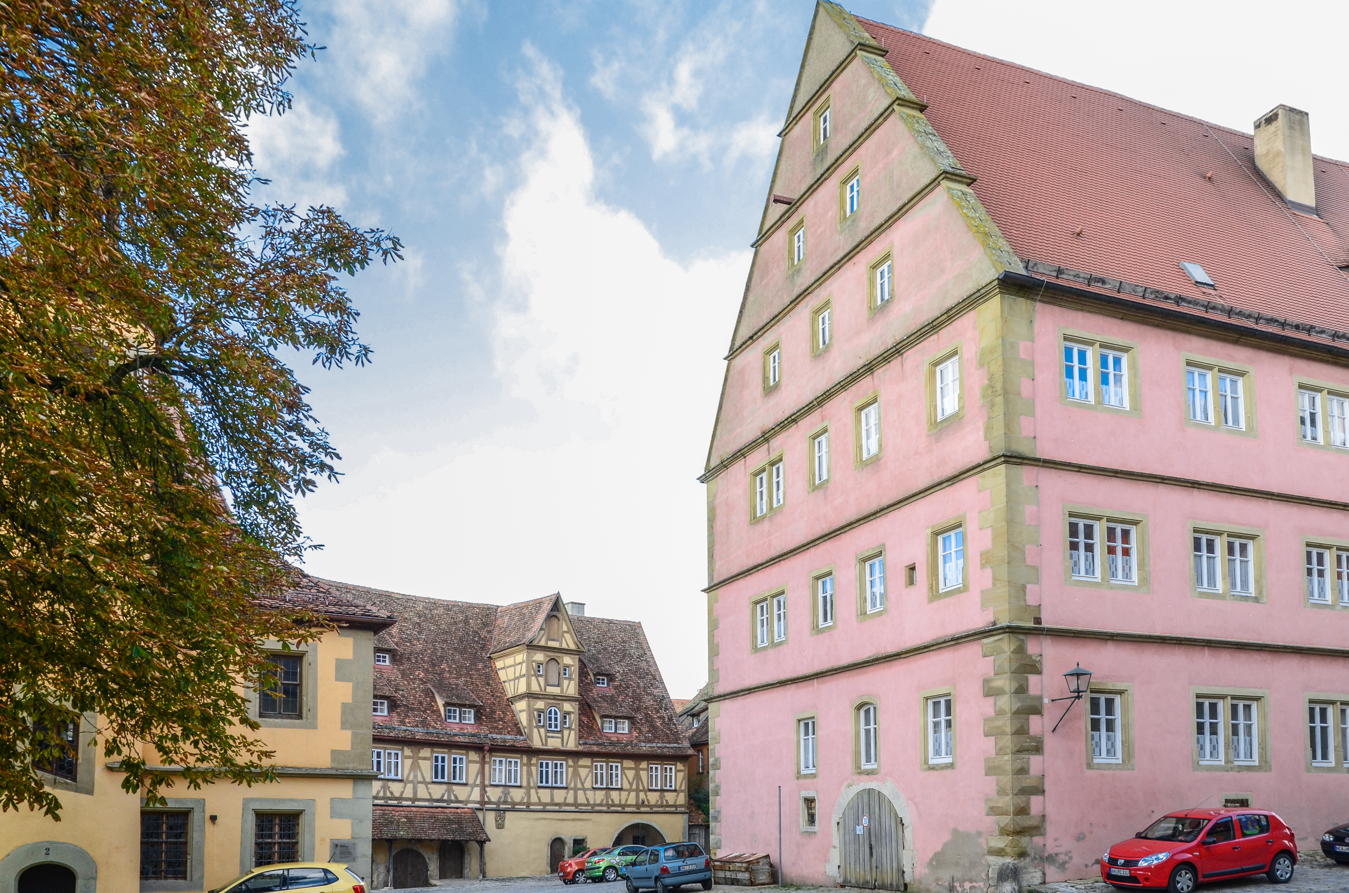 Rothenburg ob der Tauber, Spitalgasse 48